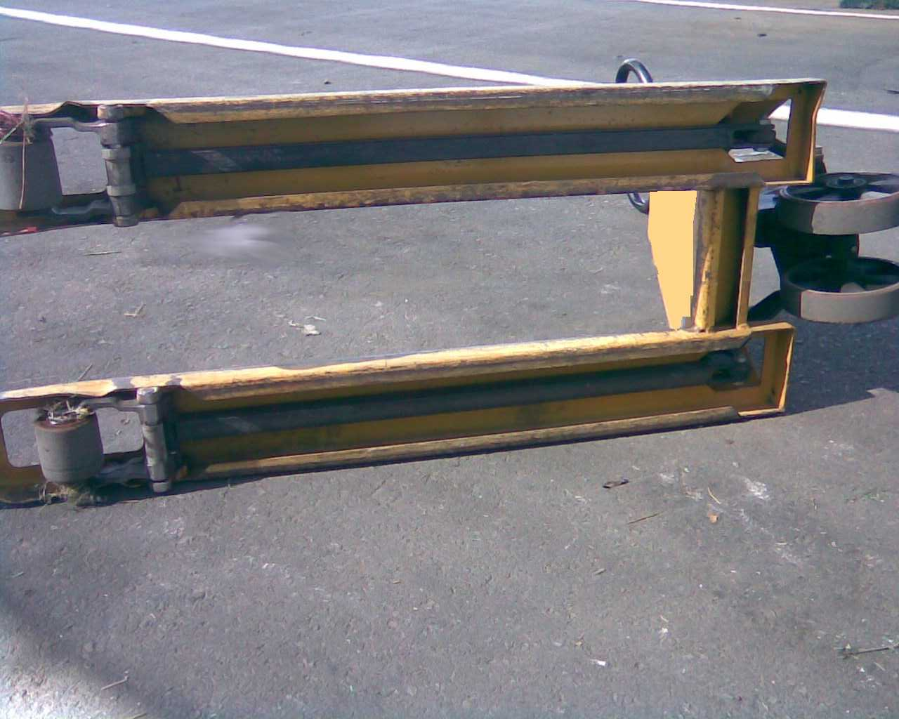 עגלת משטחים, ניתן לראות את מוטות הקישור בתחתית המזלג, Pallet Jack, it possible to see the rods under the machine